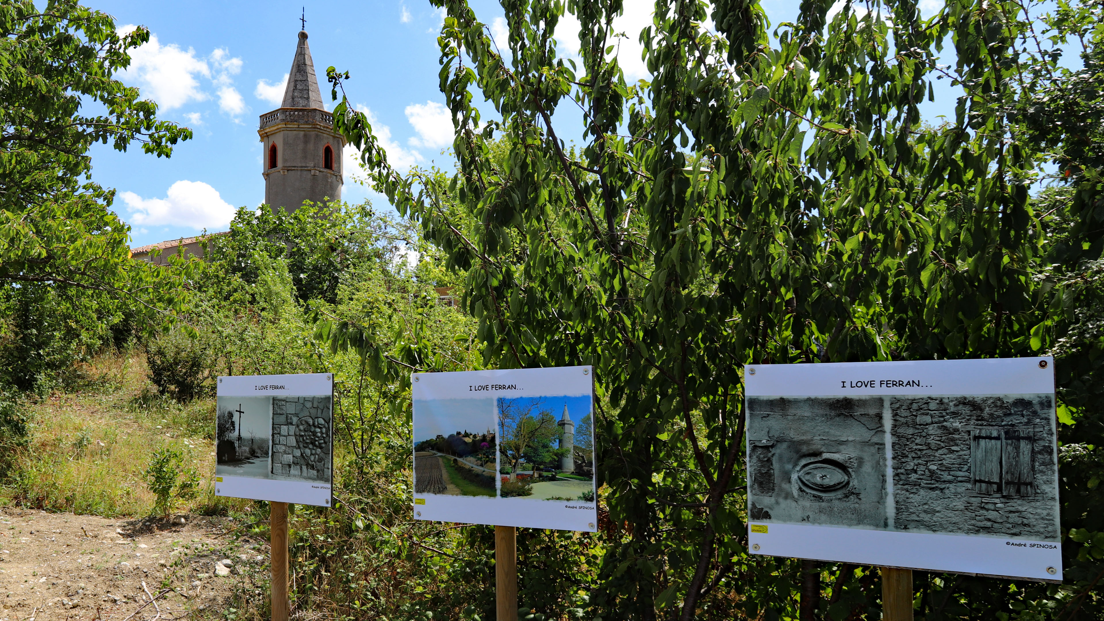 Expo Ferran